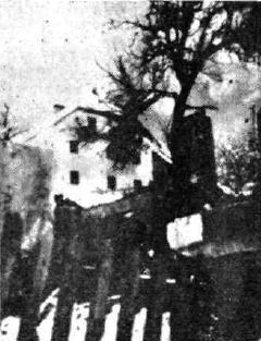 Med borbo za Dražgoše